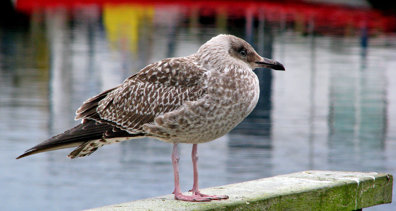 Silltrut 1k. Småbåtshamnen Ystad 17dec 2009.